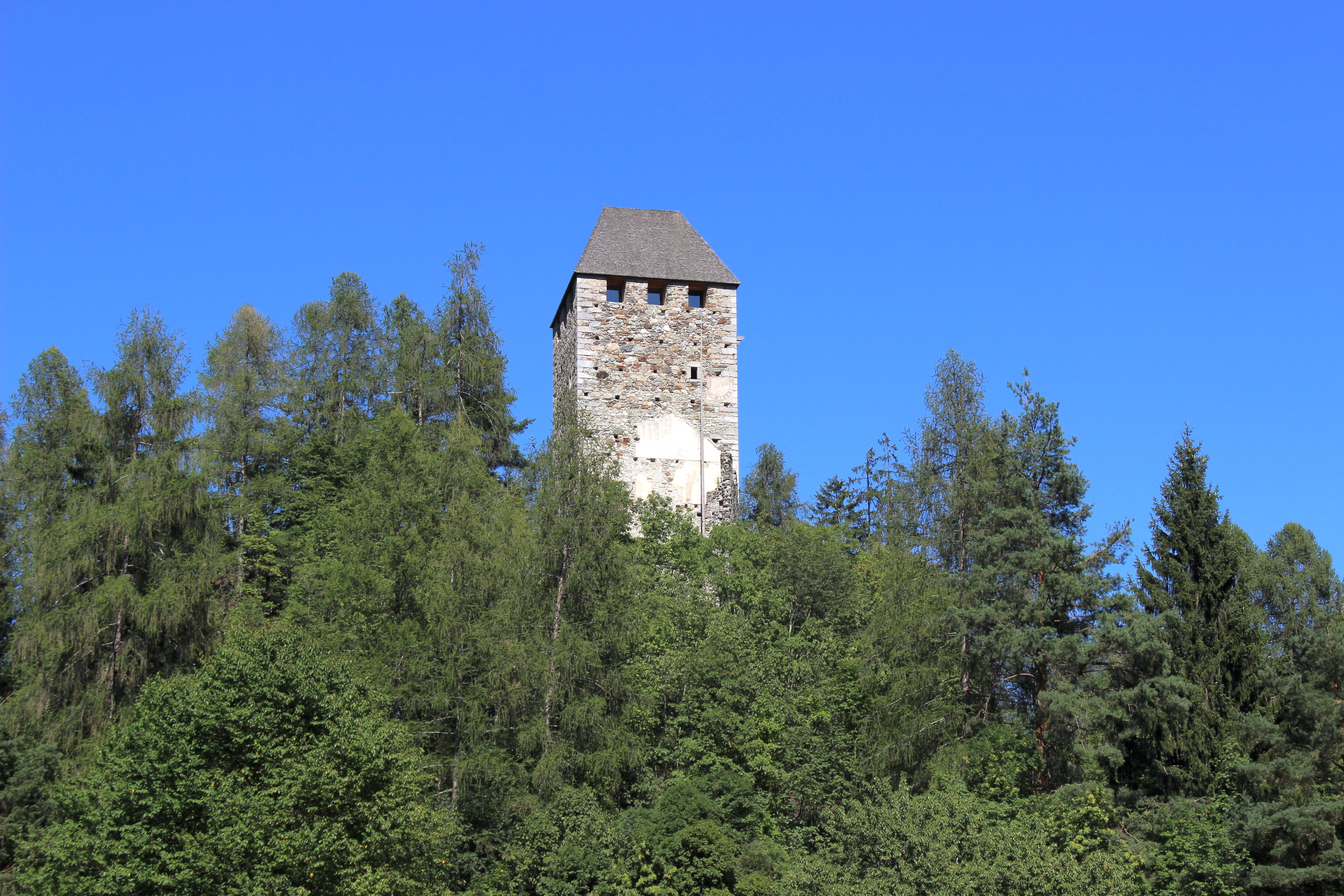 Eschenlohe bei St. Pankraz im Ultental (Südtirol)